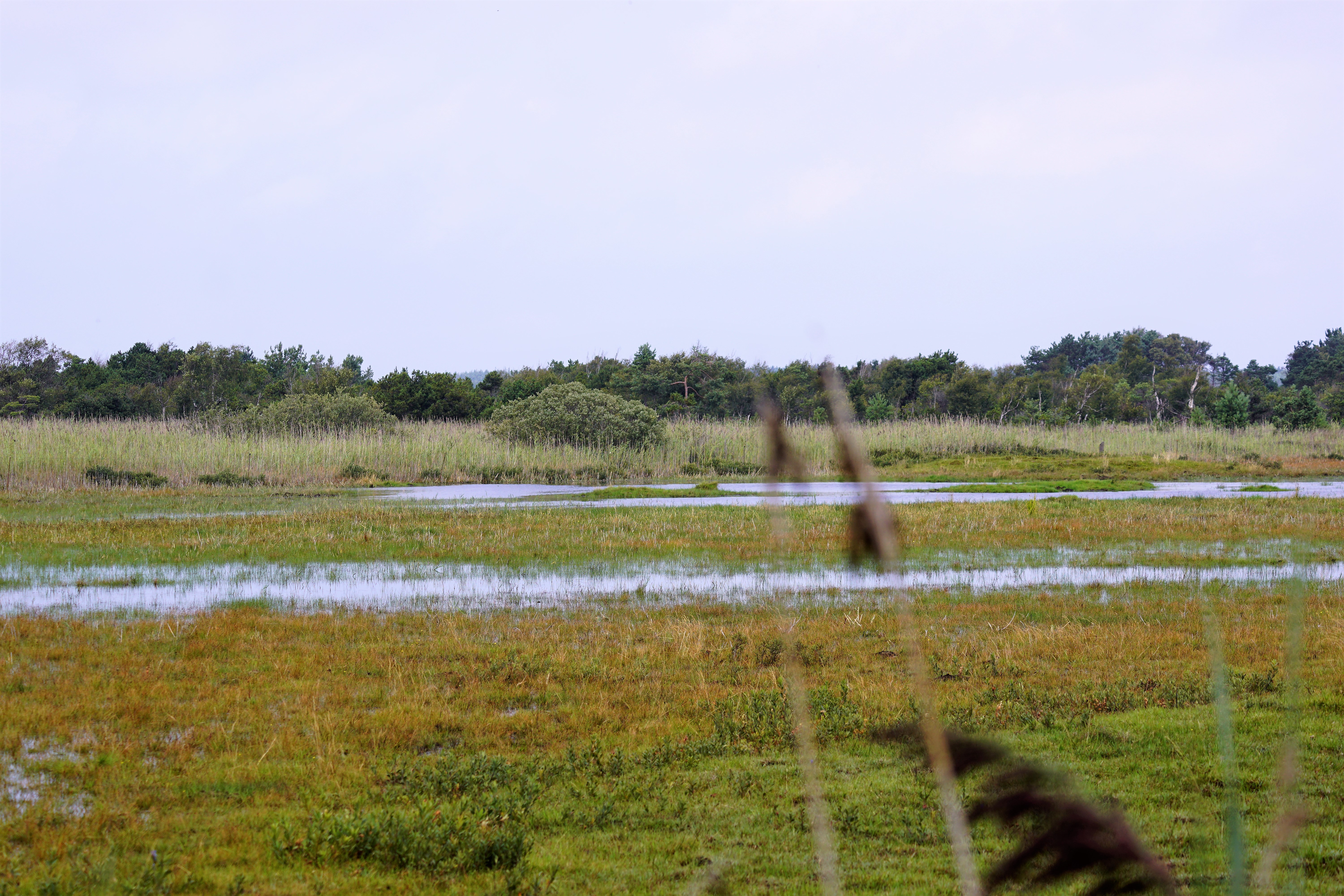 Naturområdet Kærene på Læsø set mod nordvest